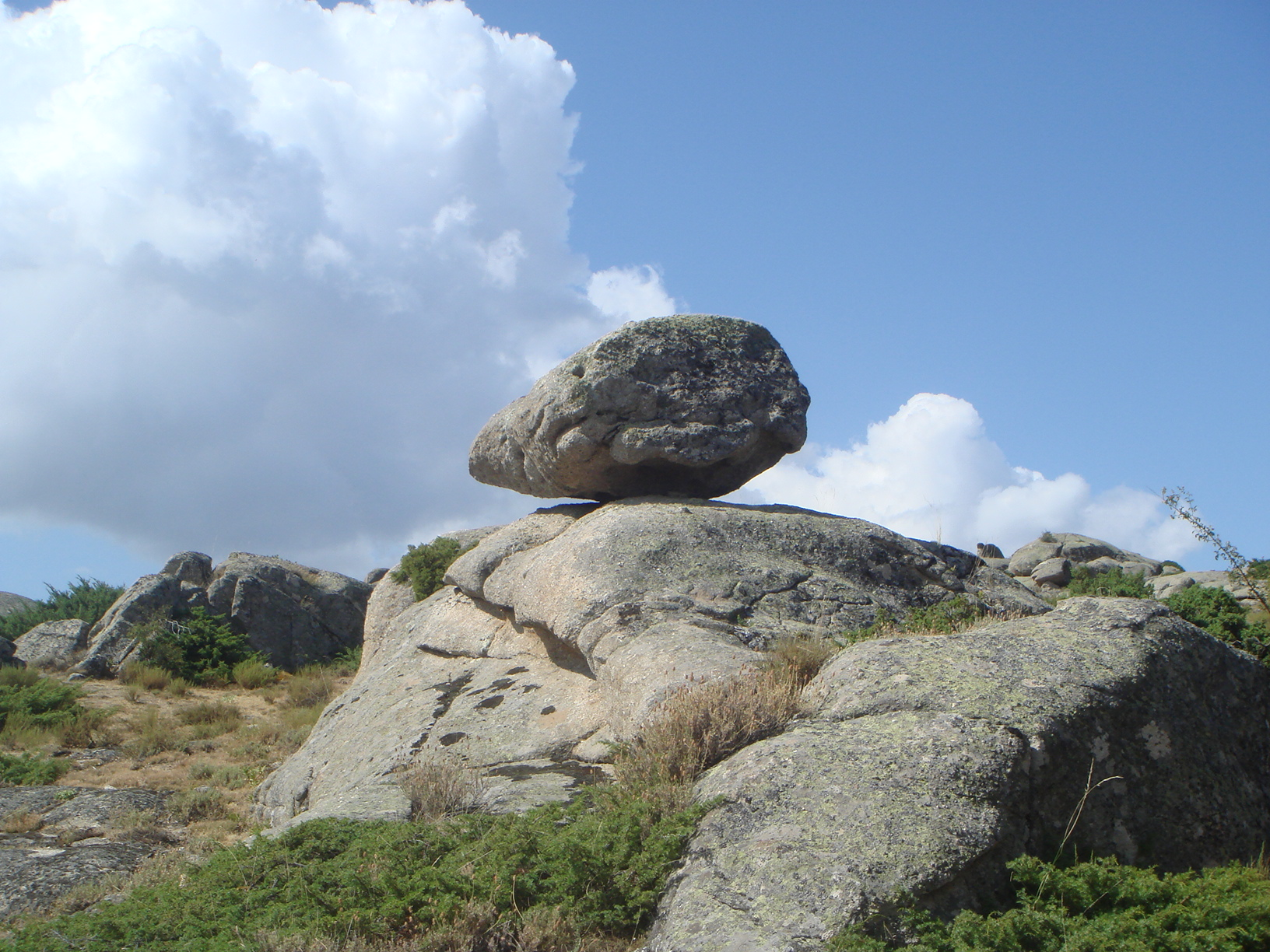 Piedra caballera de granito en la Paramera de Ávila, España